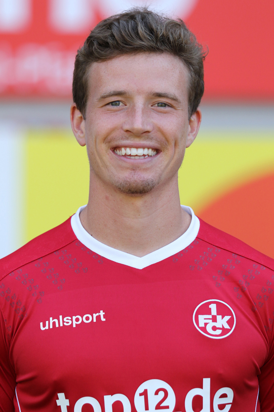 Patrick Ziegler